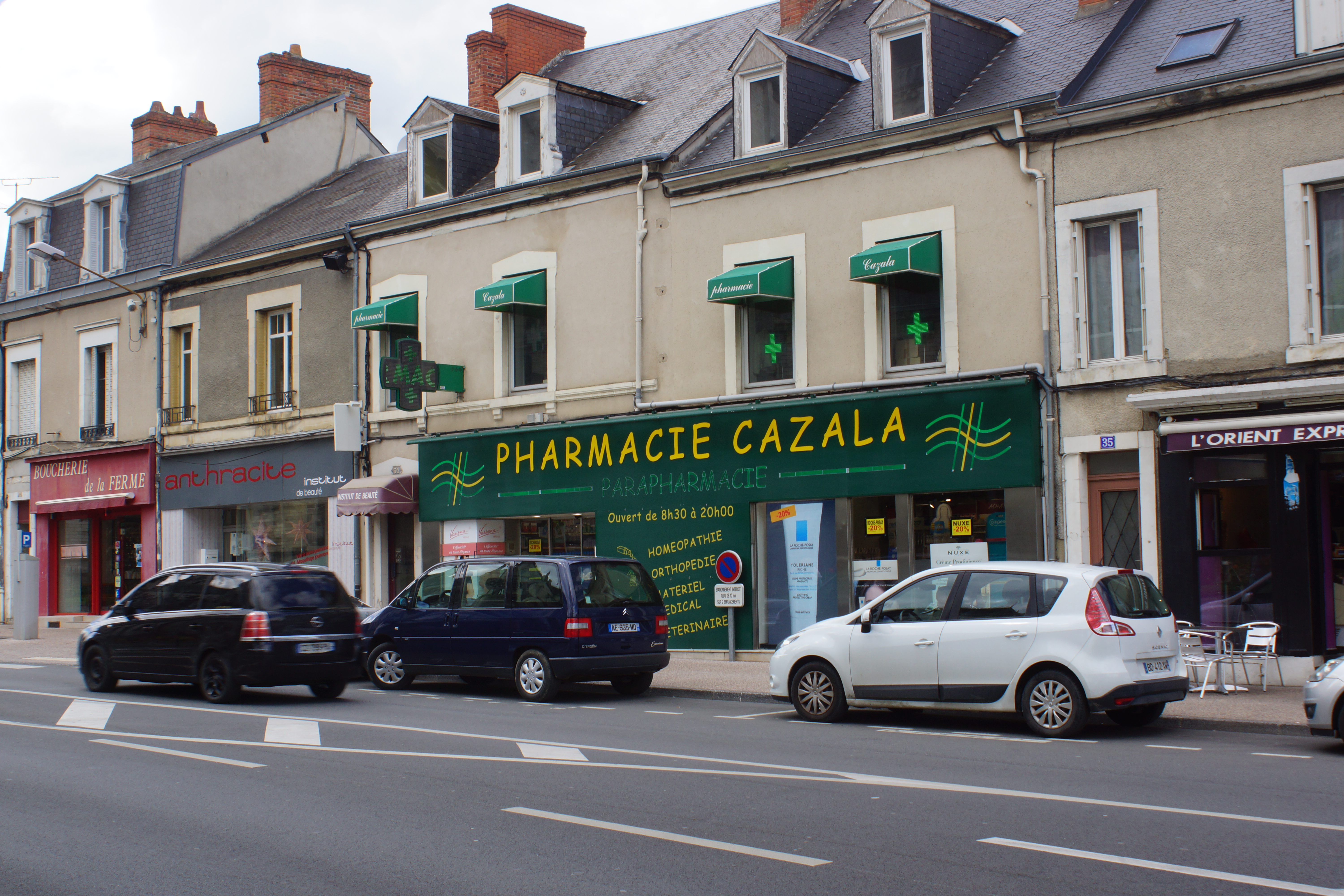 La pharmacie Cazala, rue Roger Cazala, à Châteauroux en 2016